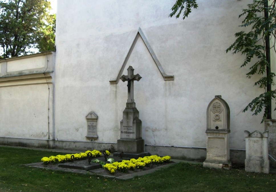 Friedhof Aspern Kirchenmauer